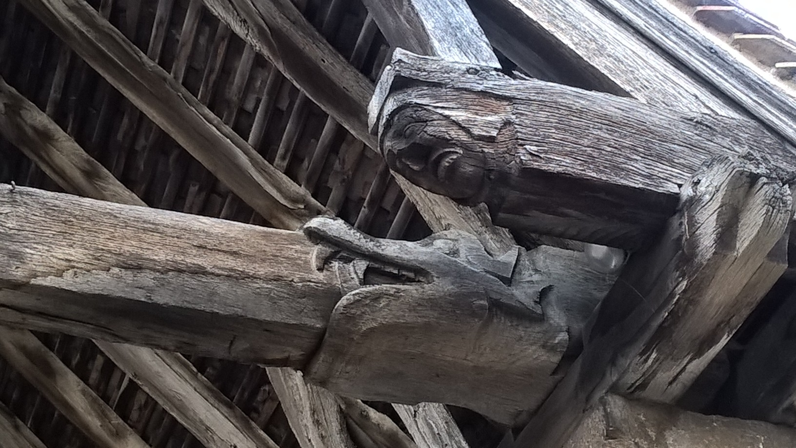 Preĝejo Sankta Nikolao Beaune la antaŭ pordo